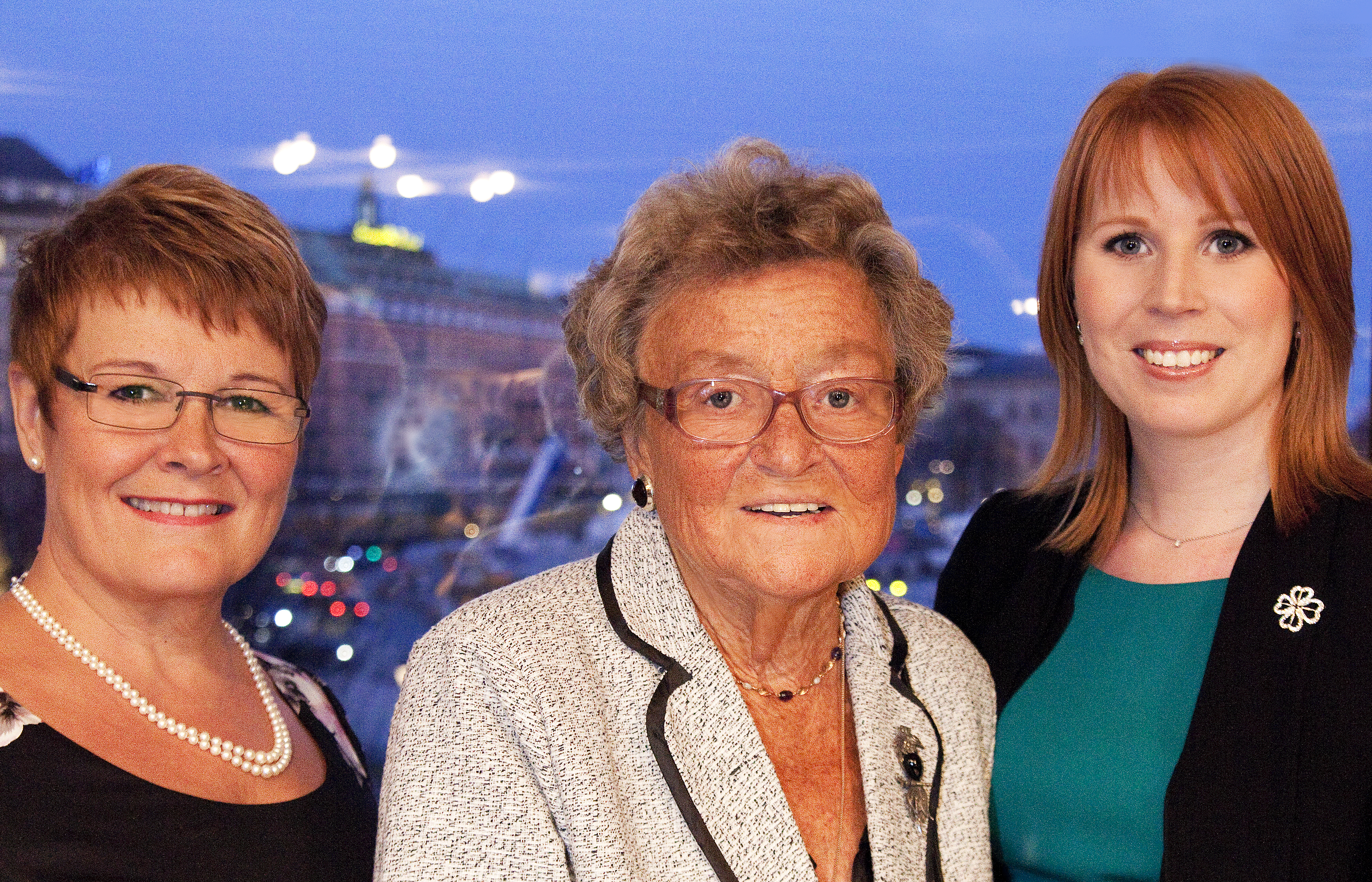 Tre generationer Centerledare. Från vänster till höger: Maud Olofsson, Karin Söder och Annie Lööf.